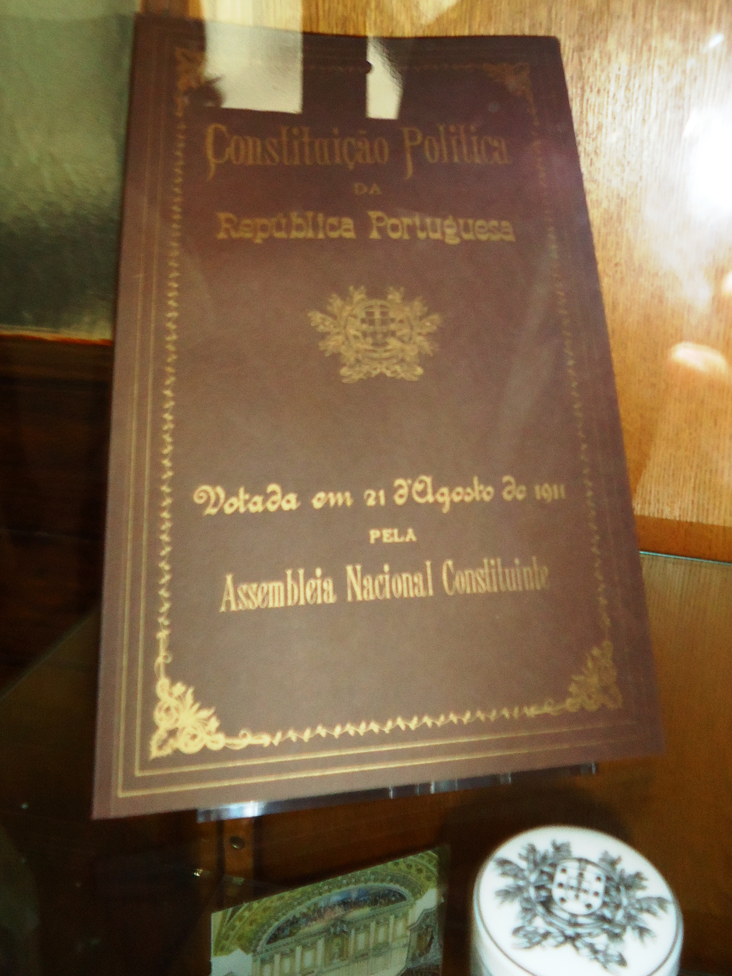 Palácio de São Bento (Assembleia da República), Lisboa, Portugal: Constituição Portuguesa de 1911.